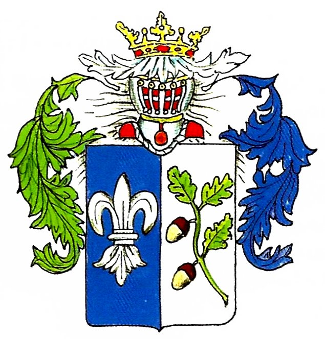 Wappen der Grabow (Adelsgeschlecht)